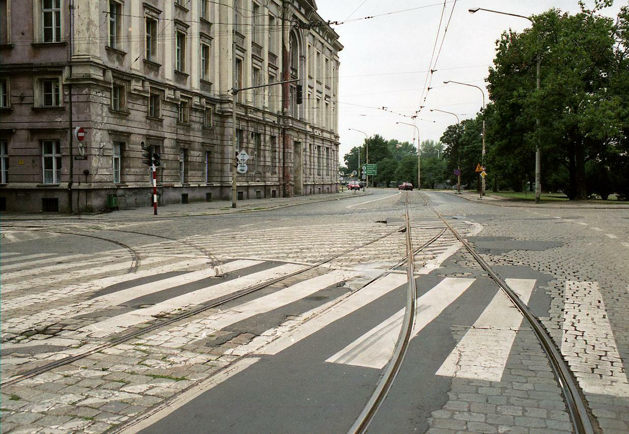 Skrzyżowanie Szewskiej z Grodzką przed przebudową.